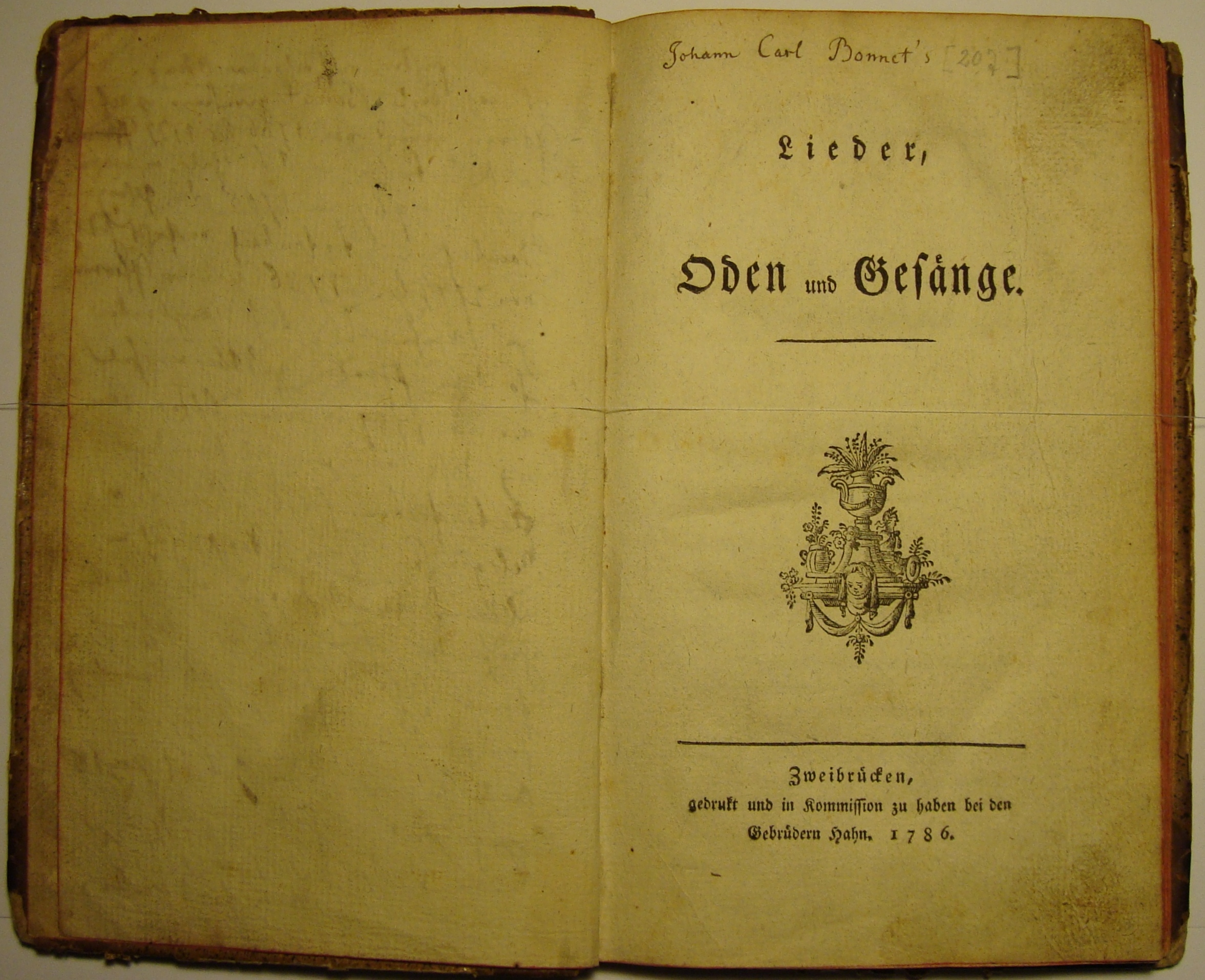 Johann Carl Bonnet: Lieder, Oden und Gesänge, 1786